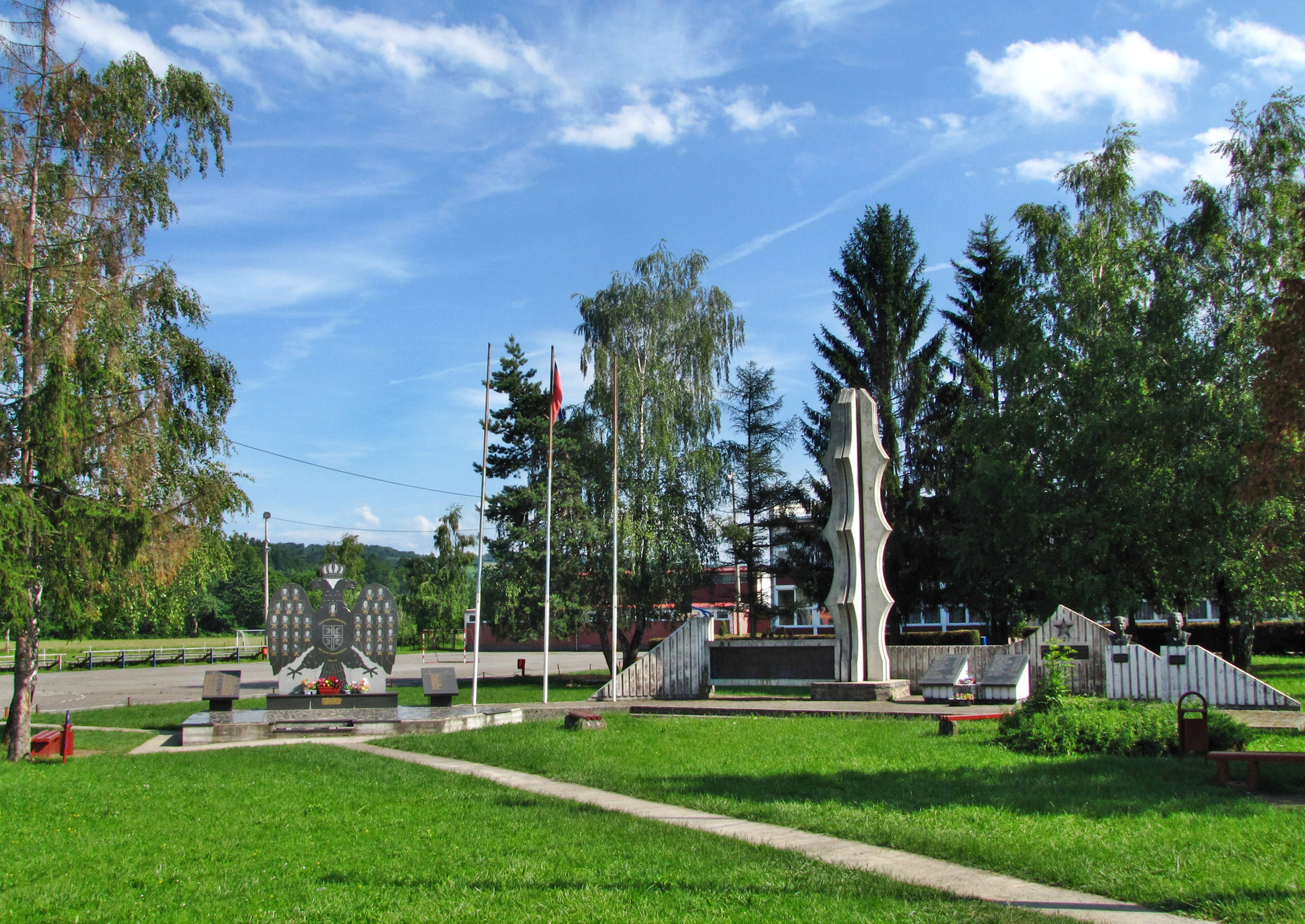 Споменици у Чечави